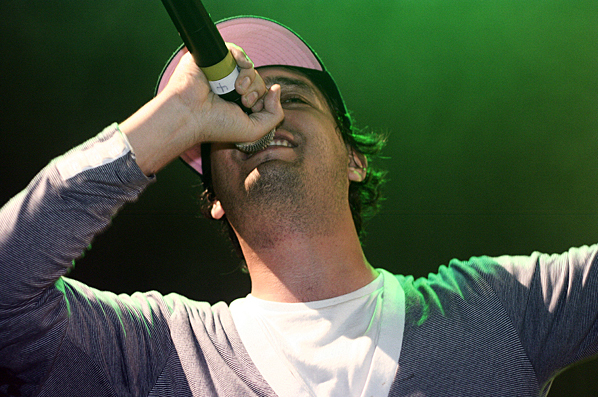 Omnikrom en spectacle au Cégep de Thetford, Thetford Mines, Québec, Canada le 4 septembre 2008.